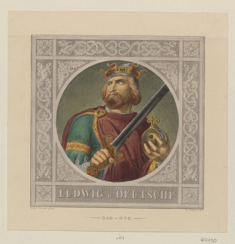 Ludwig der Deutsche, nach Trost, Royal Collection